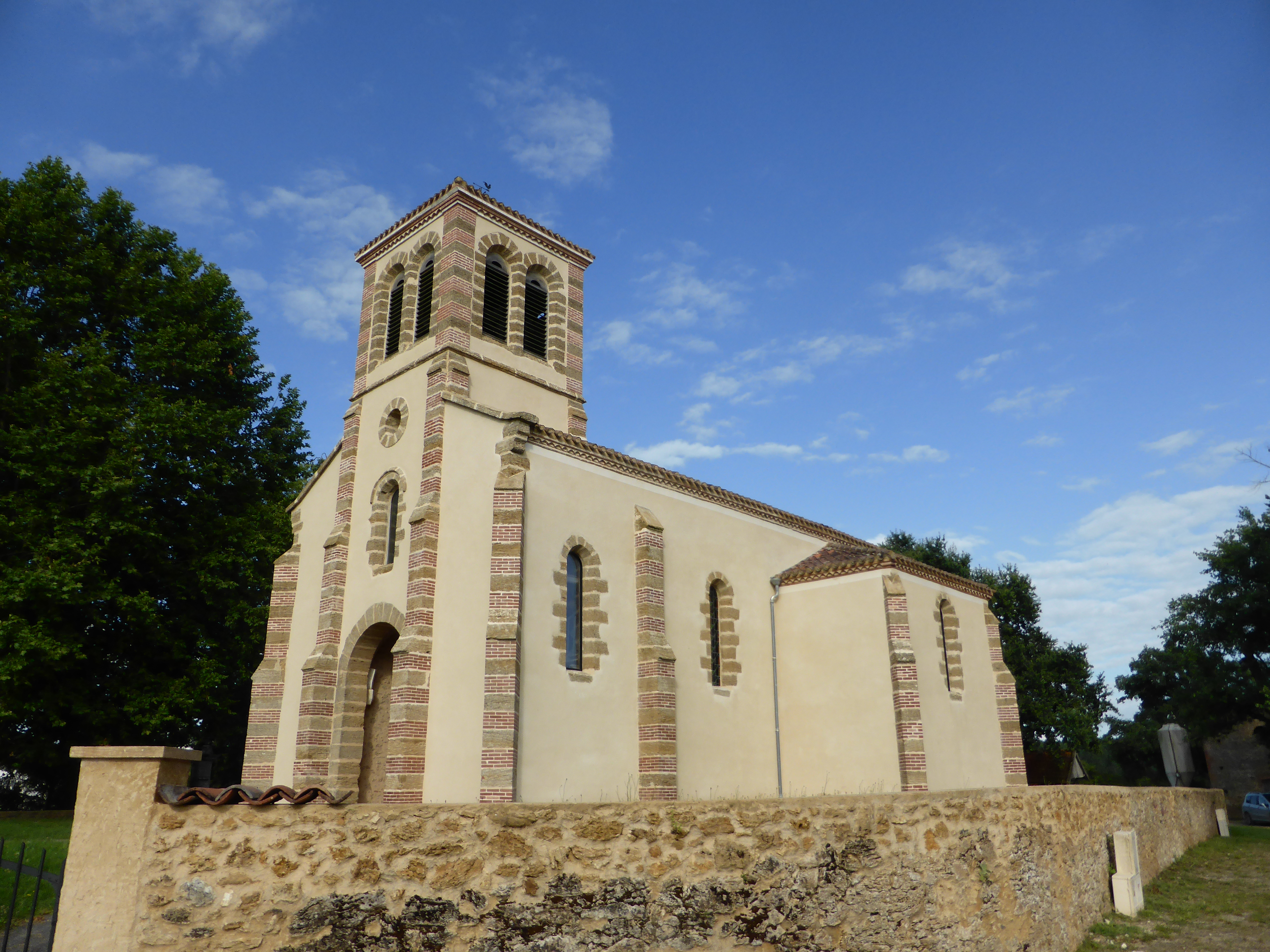 Église de Larée, dans le Gers.